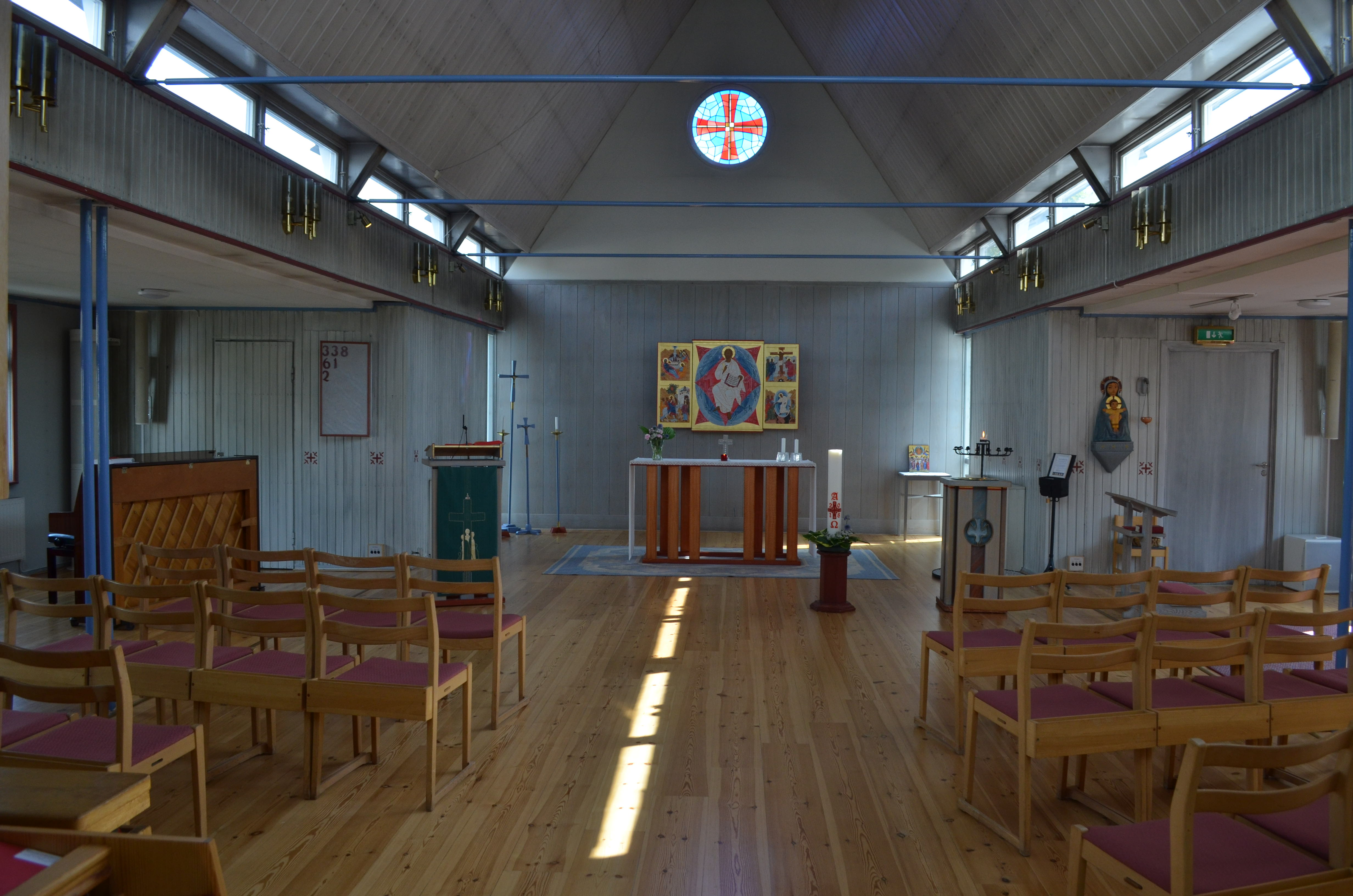 Kyrkorummet